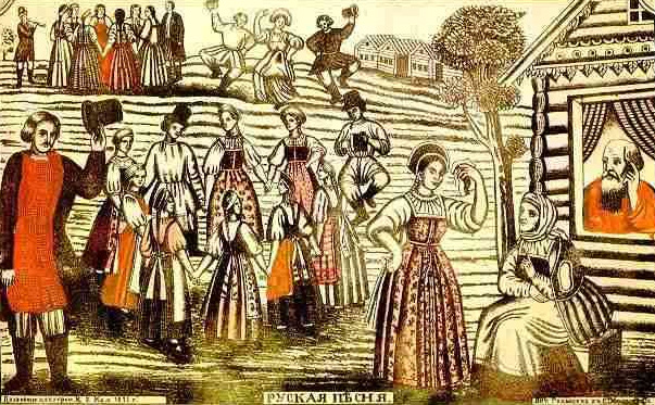 Лубок. Русская песня «Не брани меня, родная» (Народное гуляние). Литография мастерской Ивана Голышева. Мстера. 1871 год. Не брани меня, родная, Что я так люблю его. Скучно, скучно, дорогая, Жить одной мне без него. Я не знаю, что такое Вдруг случилося со мной, Что так бьется ретивое И терзается тоской. Всё оно во мне изныло, Вся горю я как огнем, Всё немило мне, постыло, Всё страдаю я по нем. Мне не надобны наряды И богатства всей земли... Кудри молодца и взгляды Сердце бедное зажгли... Сжалься, сжалься же, родная, Перестань меня бранить. Знать, судьба моя такая - Я должна его любить!